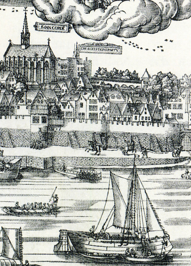 Ausschnitt mit Klosterkirche-Jan-Cordula-und-Eigelsteintor aus dem Holzschnitt „Große Ansicht von Köln“